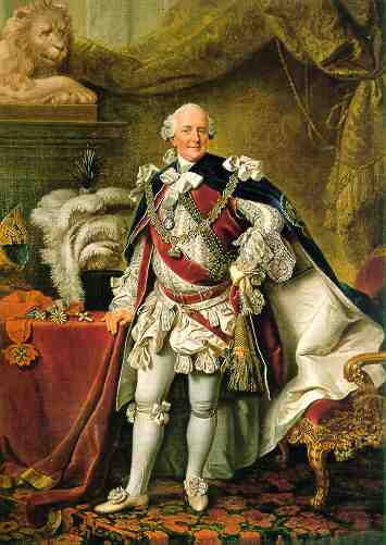 Фердинанд, принц Брауншвейгский